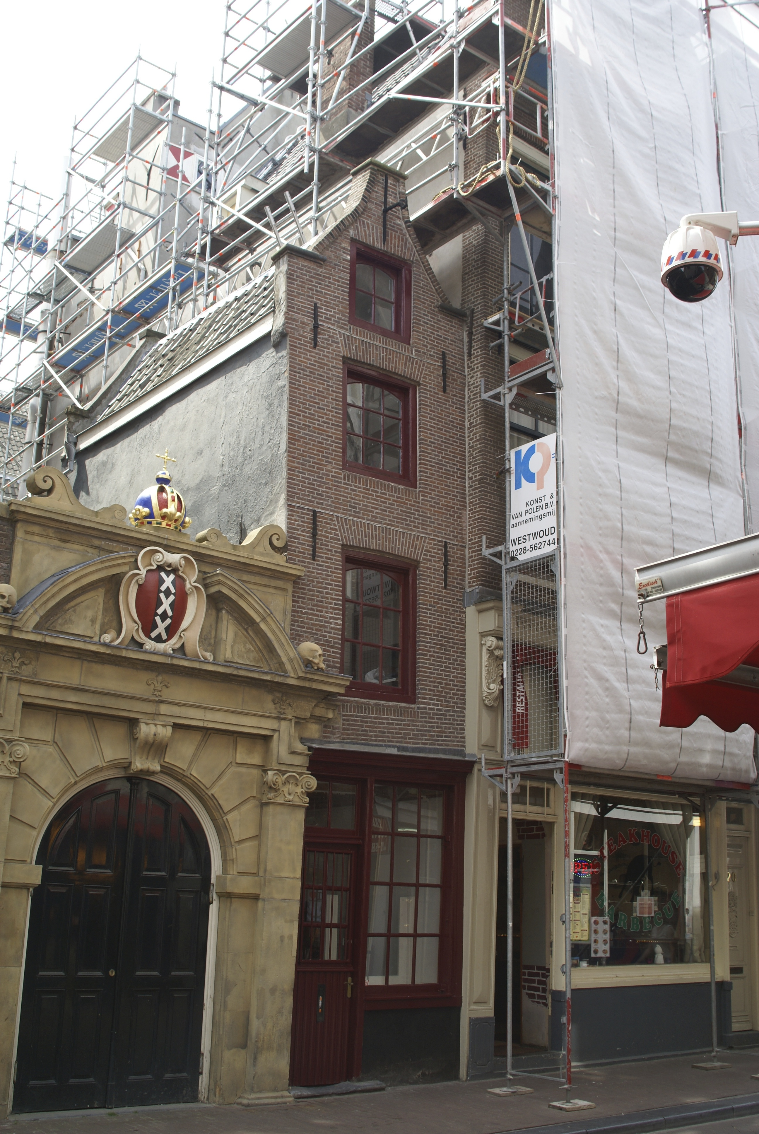 Dit huis is 2,02 meter breed en 5 meter diep en is gelegen aan de Oude Hoogstraat